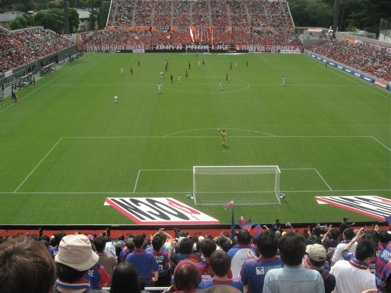 Ōmiya Park Soccer Stadium, Saitama Prefecture, Japan. On May 3, 2008. Omiya Ardija vs. F.C. Tokyo.